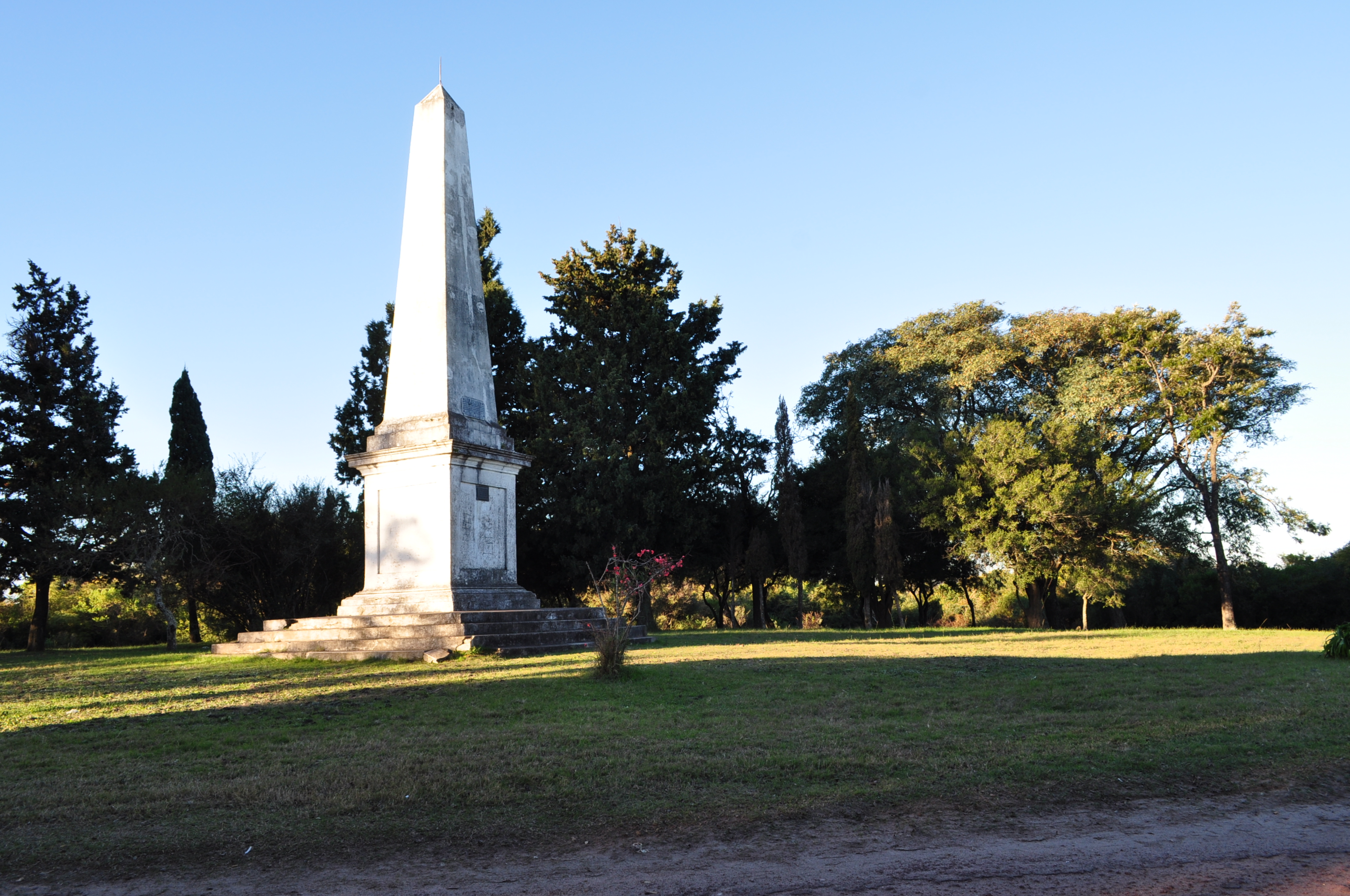 Obelisco a Juan Díaz de Solís. Ubicada en el departamento de Colonia